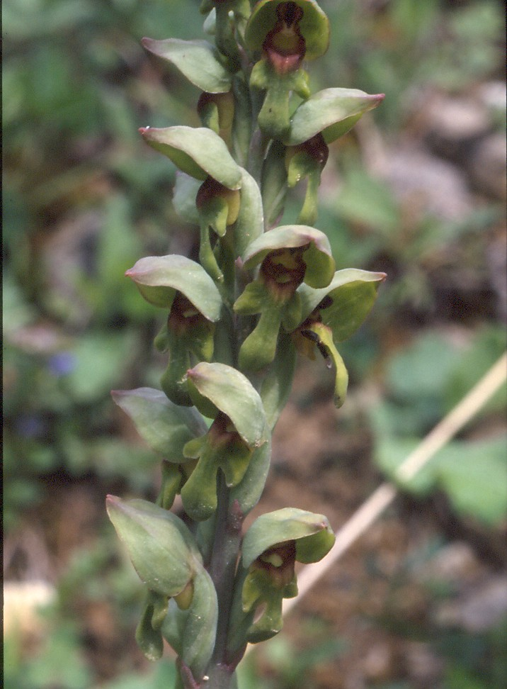 Steveniella satyrioides, Türkei - Zigana-Pass